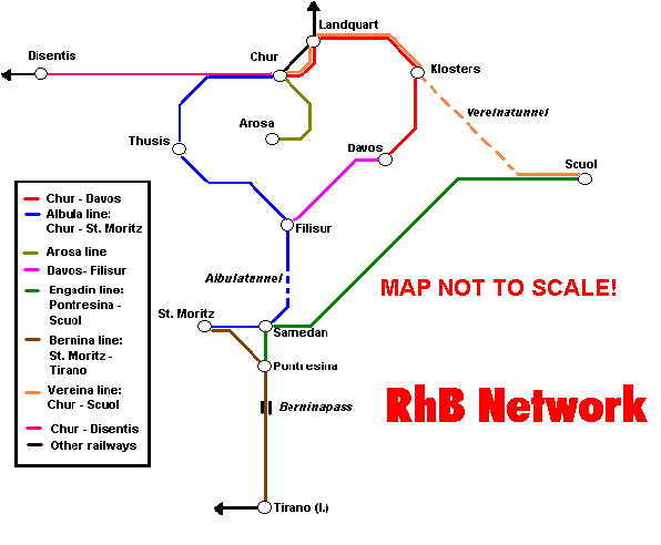 Eigen kaart RhB